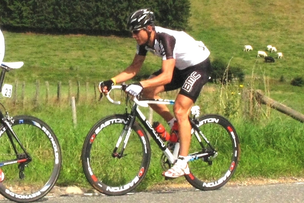 De Martin Kohler um Grand Prix de Wallonie 2008 Quell: eege Foto Les Meloures Kategorie:Schwäizer Vëlossportler